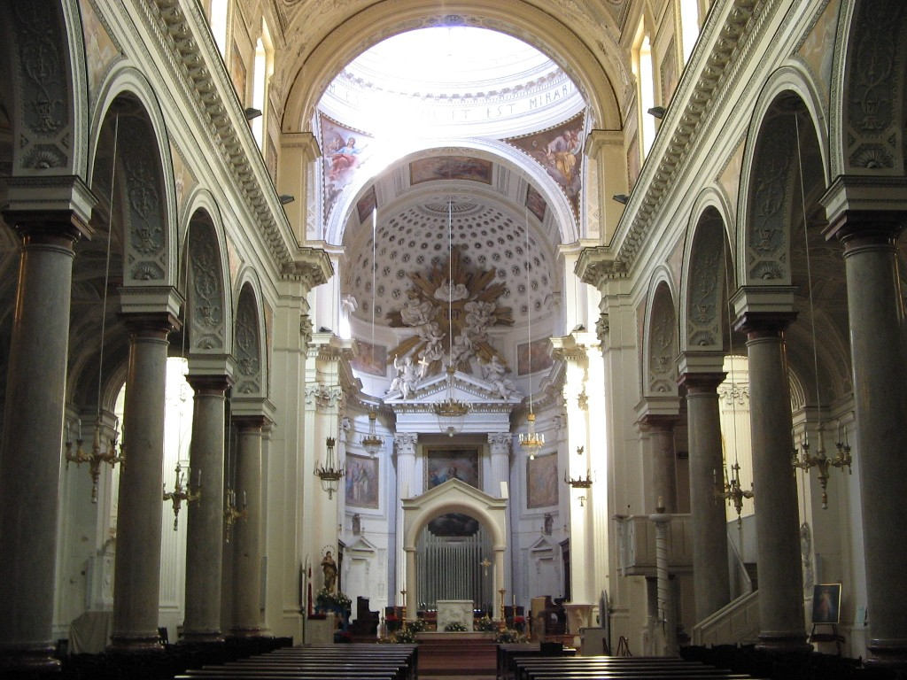 Trapani, Cattedrale S. Lorenzo (interno) - Foto D. Pennisi